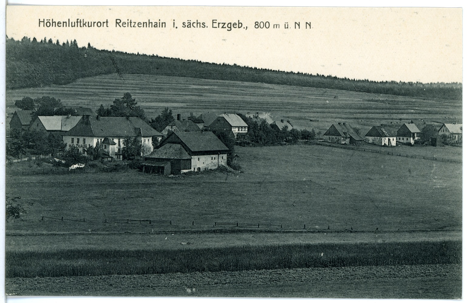 Reitzenhain; Blick auf Reitzenhain This postcard is from publisher Brück & Sohn in Meißen ( postcard has a unique number 21094 and is available in a higher resolution at the publisher. This images was uploaded in a cooperation project between Wikipedians and the publisher.